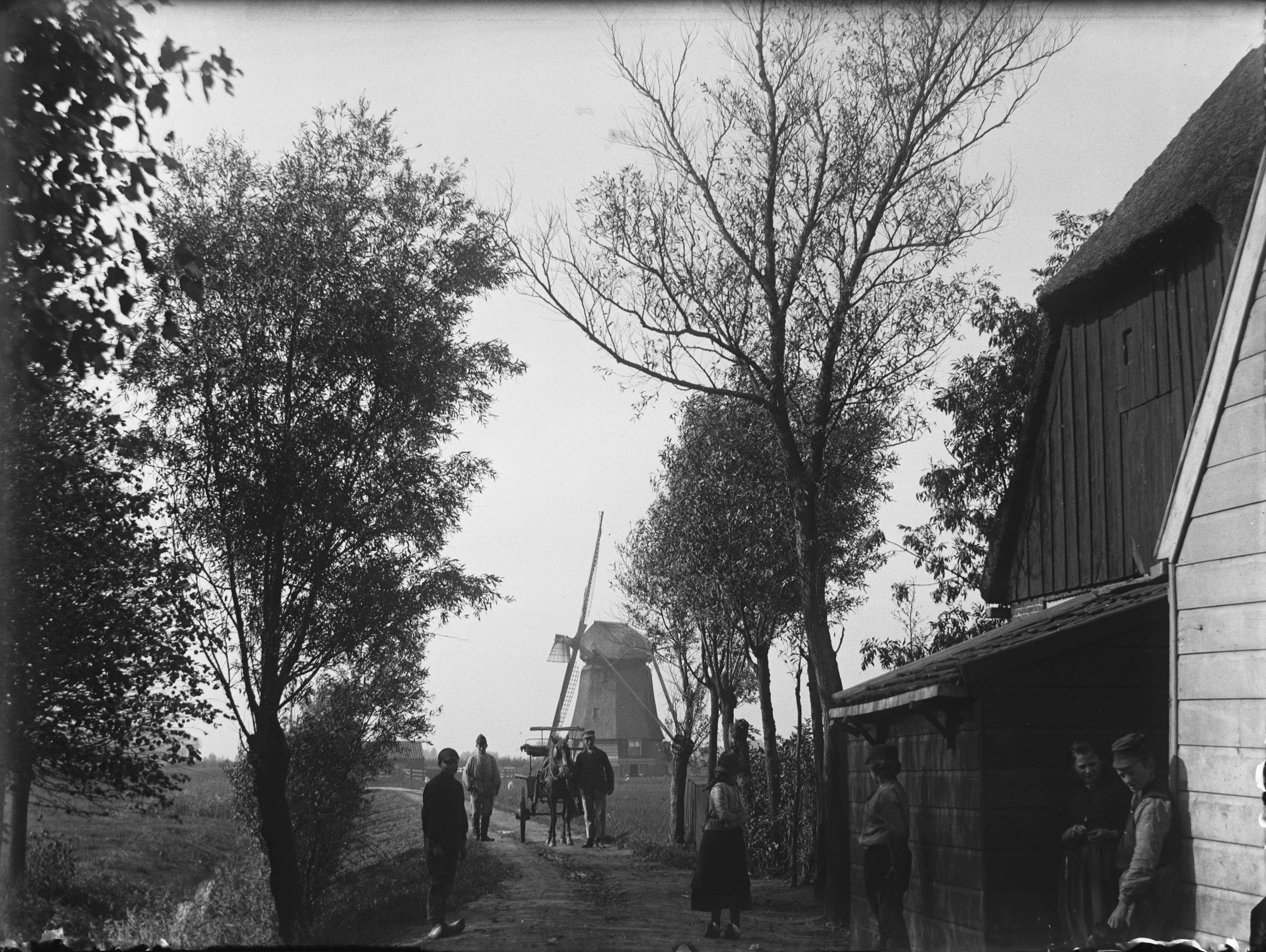 Weg naar het Fort (latere Abcouderstraatweg) met molen Westbijlmerpolder. Duivendrecht.